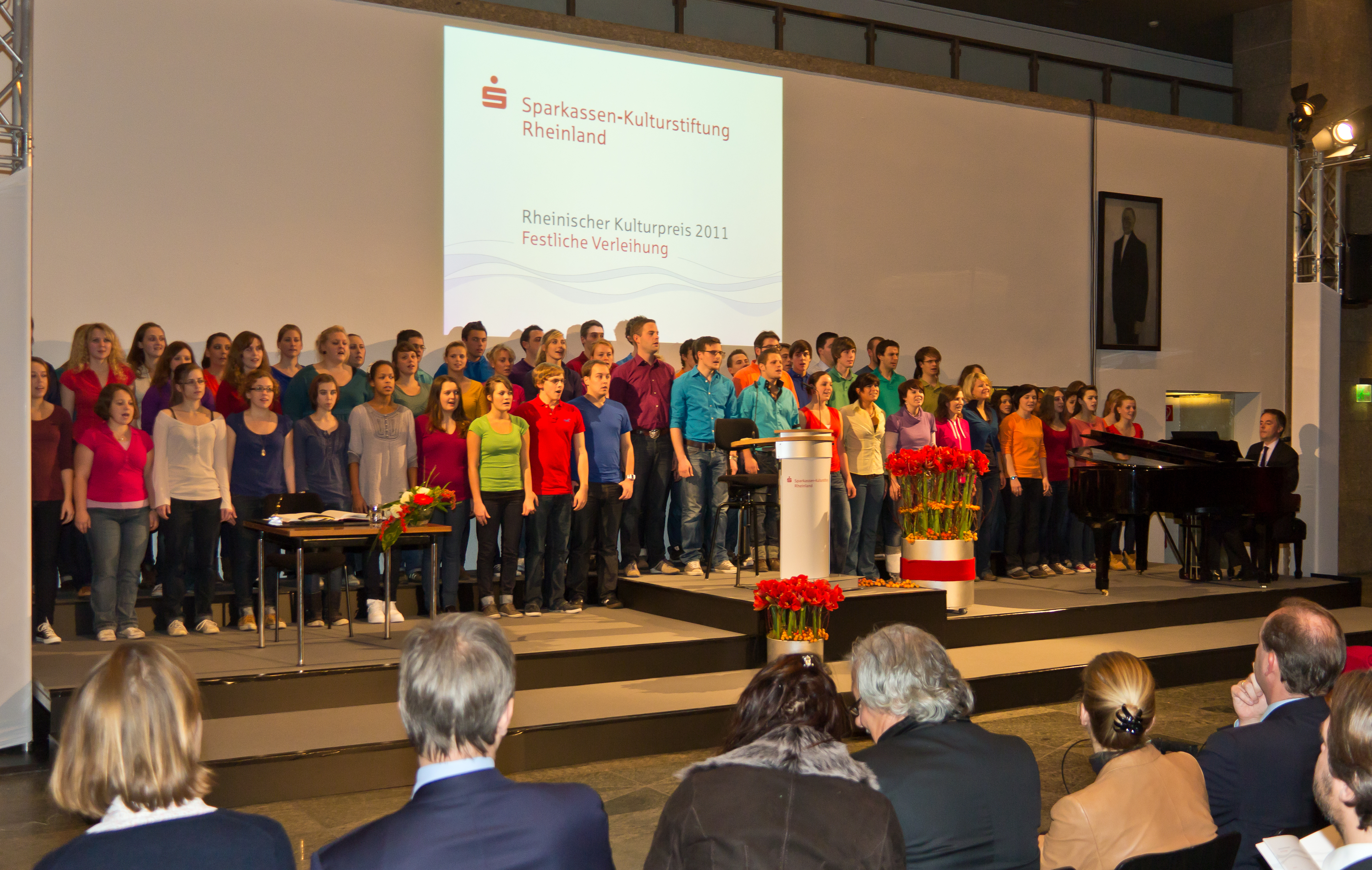 Verleihung des Förderpreises 2011 der Sparkassen-Kulturstiftung Rheinland in der Piazetta des historischen Rathauses von Köln an Fatih Çevikkollu, Kabarettist